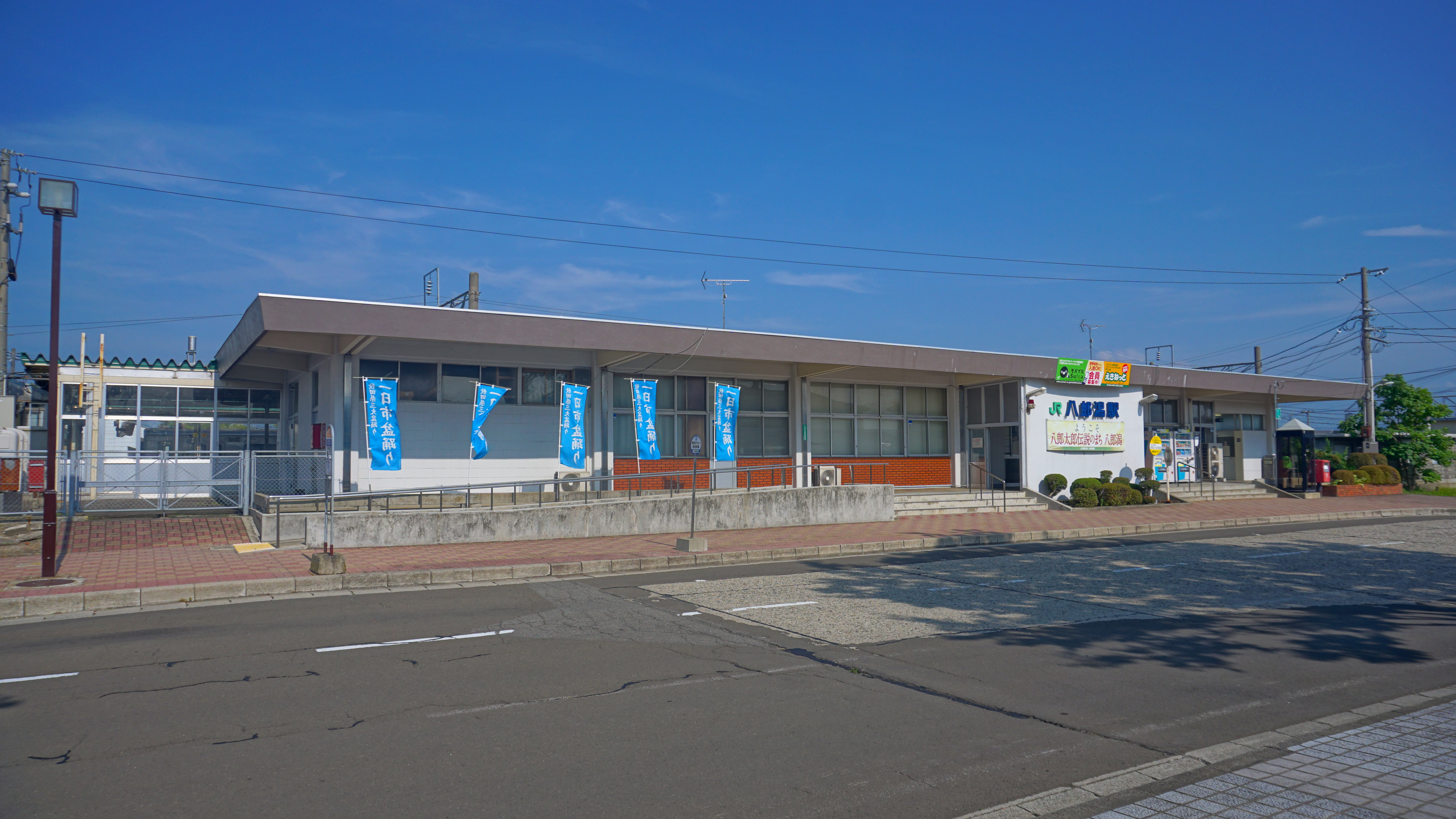 奥羽本線 八郎潟駅（秋田県南秋田郡八郎潟町）